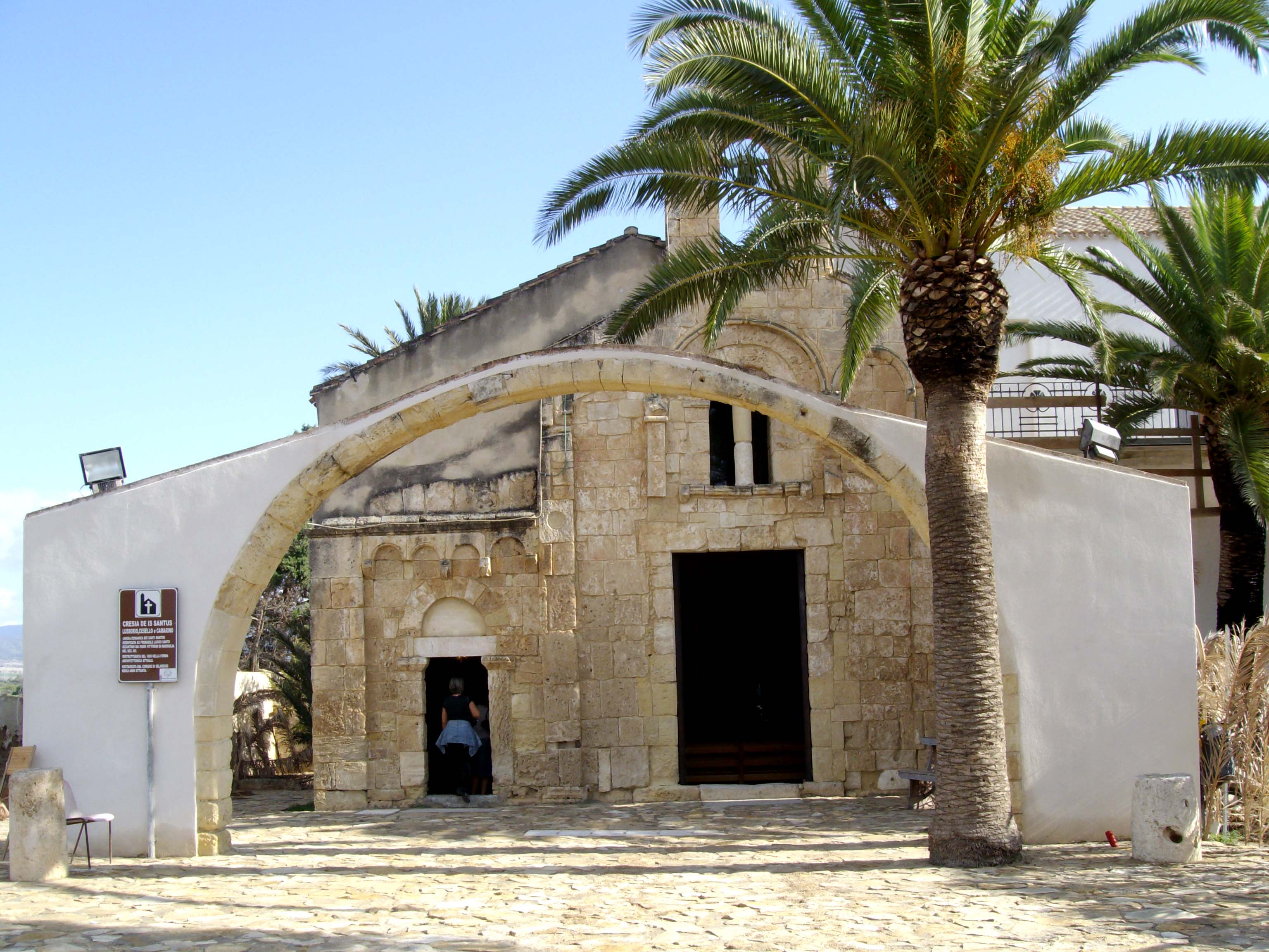 Chiesa di San Lussorio (XII - XIII secolo) - Selargius